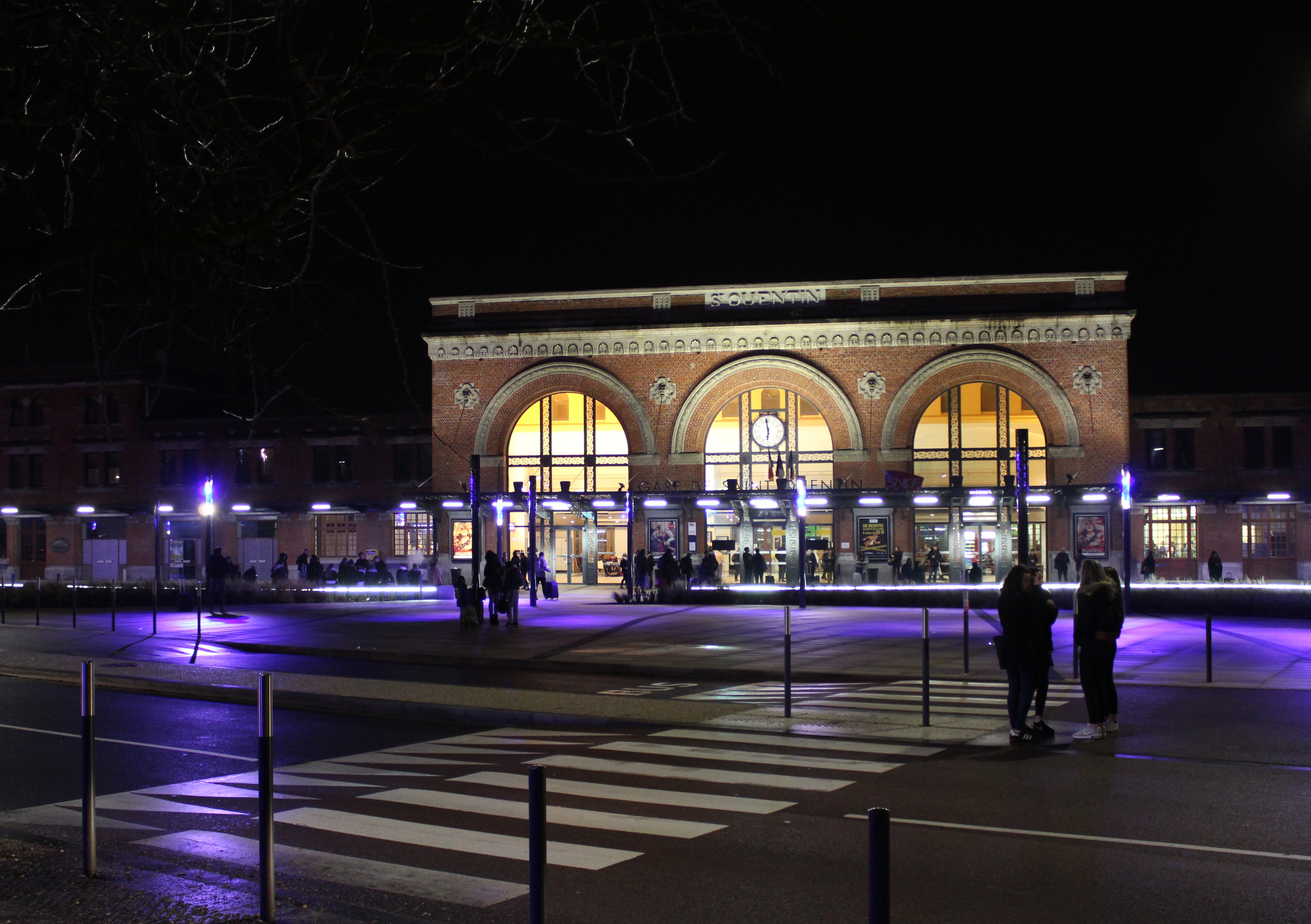 La gare de Saint-Quentin la nuit